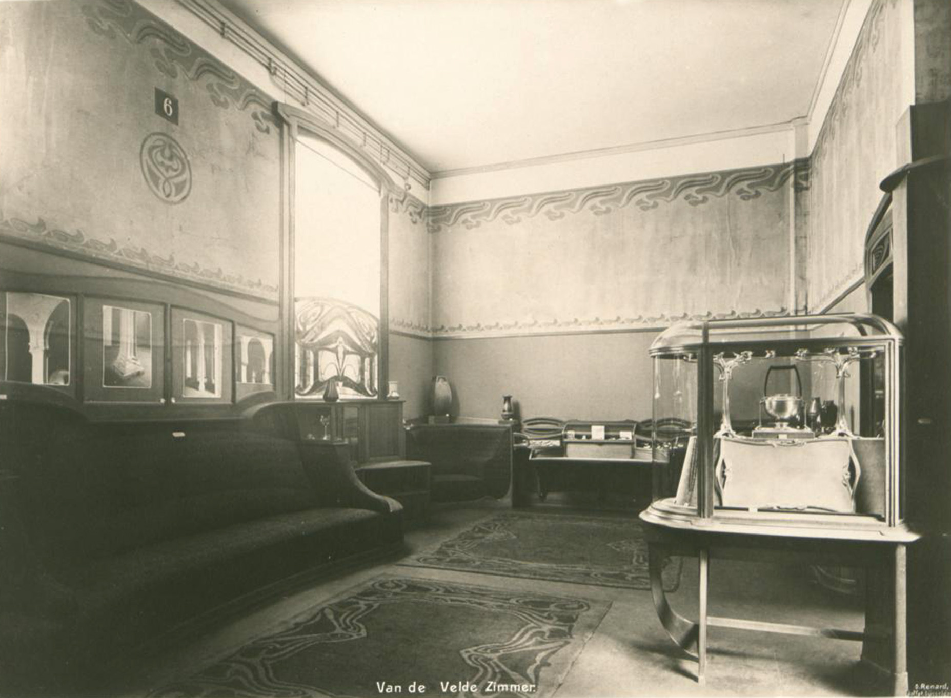 Kunstpalast, Raum 6 Henry van de Velde Zimmer, Foto Otto Renard, 1902